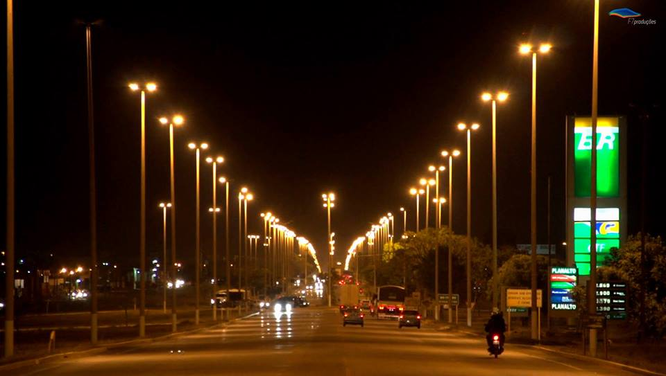 Vilhena